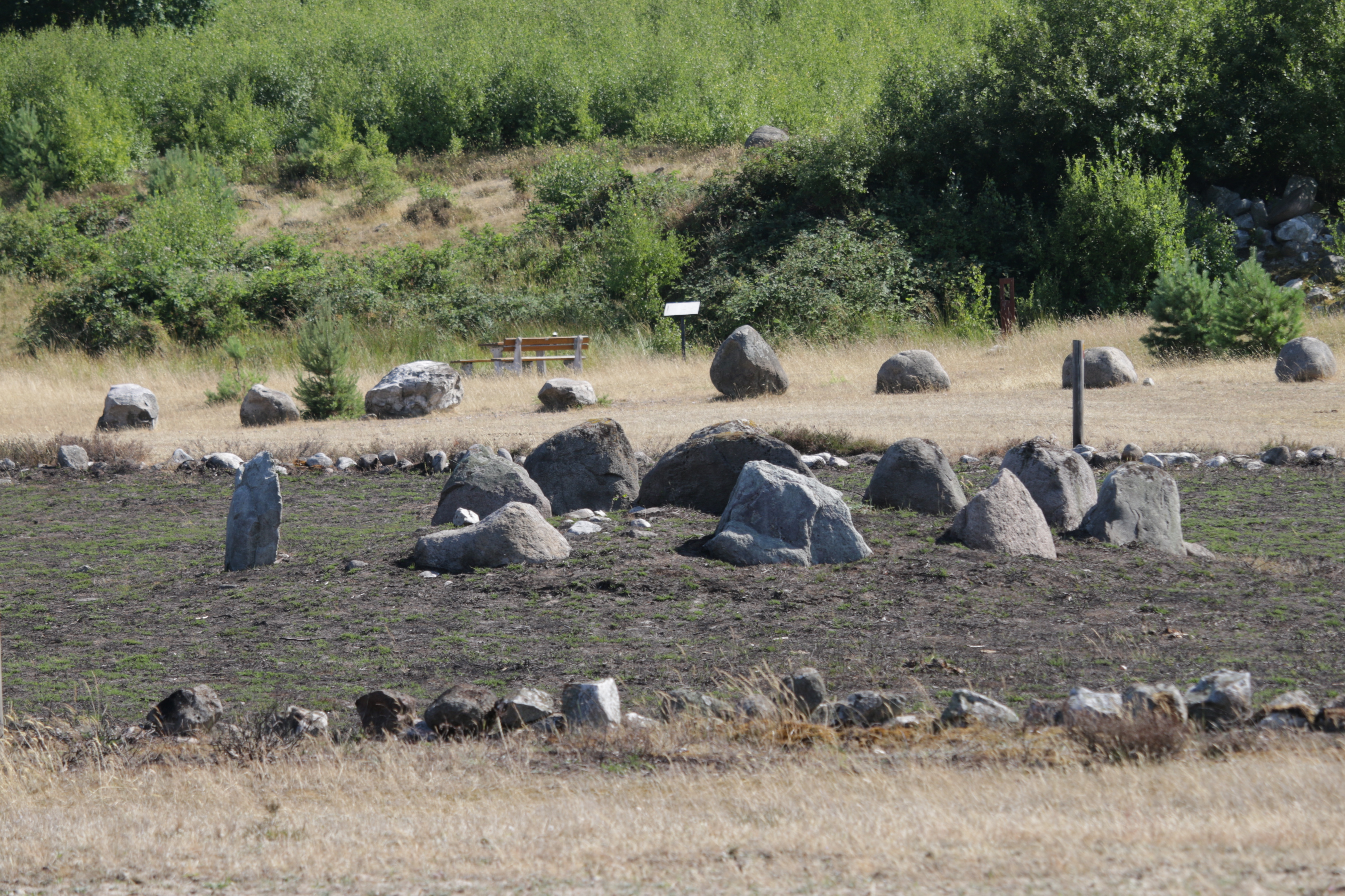 Knäbäcksdösen, Ravlunda 26-1, Stenkammargrav